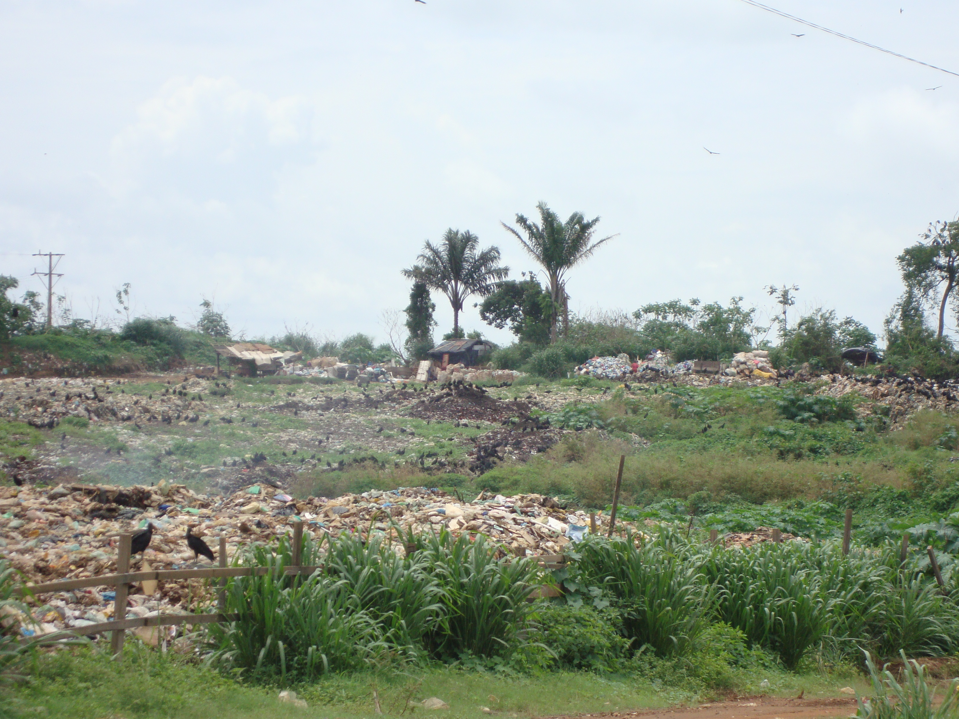 Imagem do lixão da área urbana de Altamira, no estado do Pará.